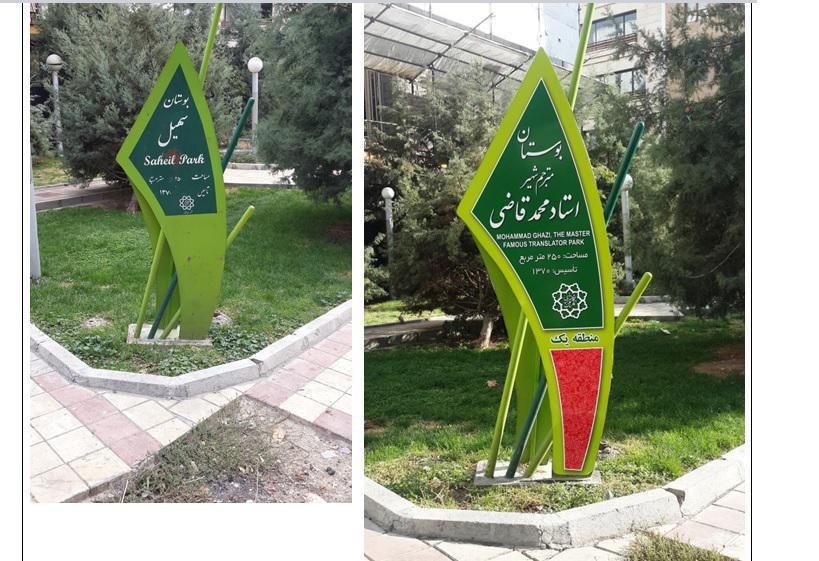 بوستان محمد قاضي؛ مترجم شهير معاصر